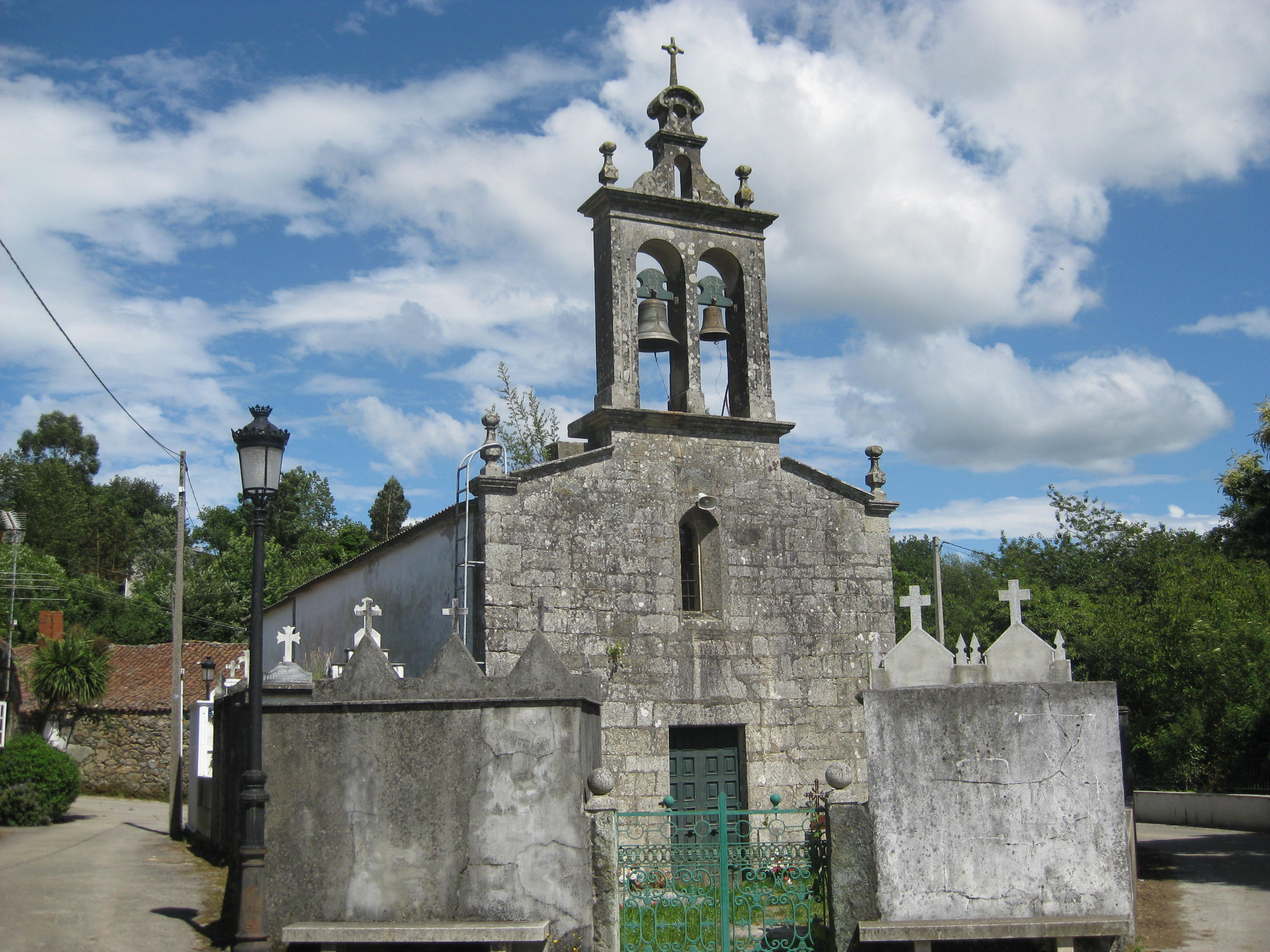 Igrexa de Santo Estevo de Vilamor, concello de Toques.